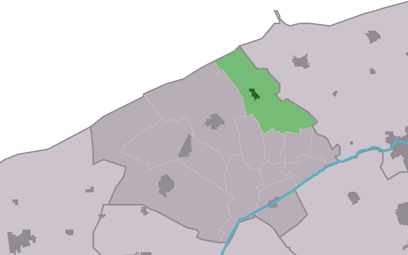 Kaartsje fan himrik fan Blije